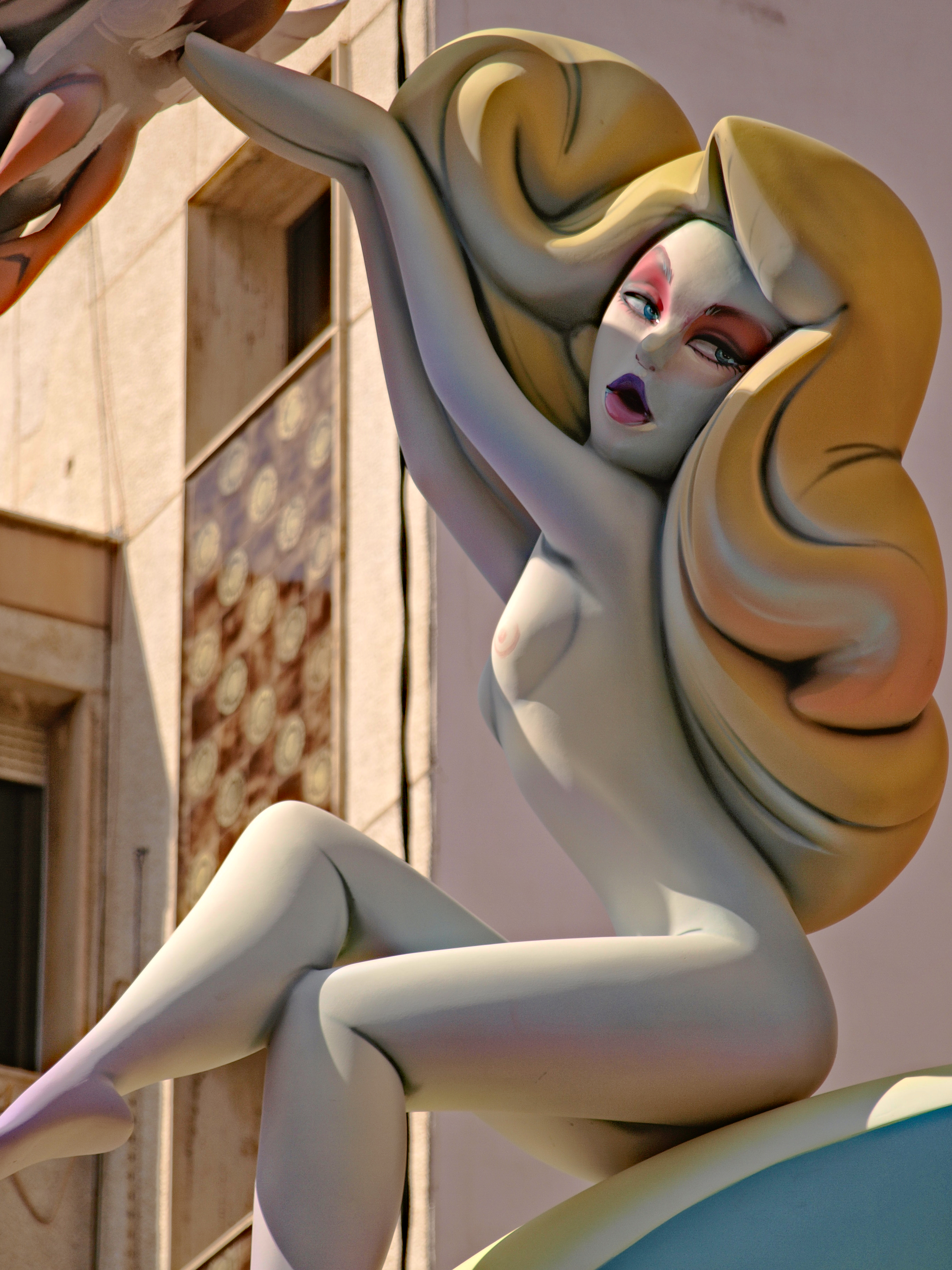 detall de la Falla Passeig-Mercat de Cullera, 2014 This is a photography of a Folklore festival in Spain (Wikidata id Q23663326).